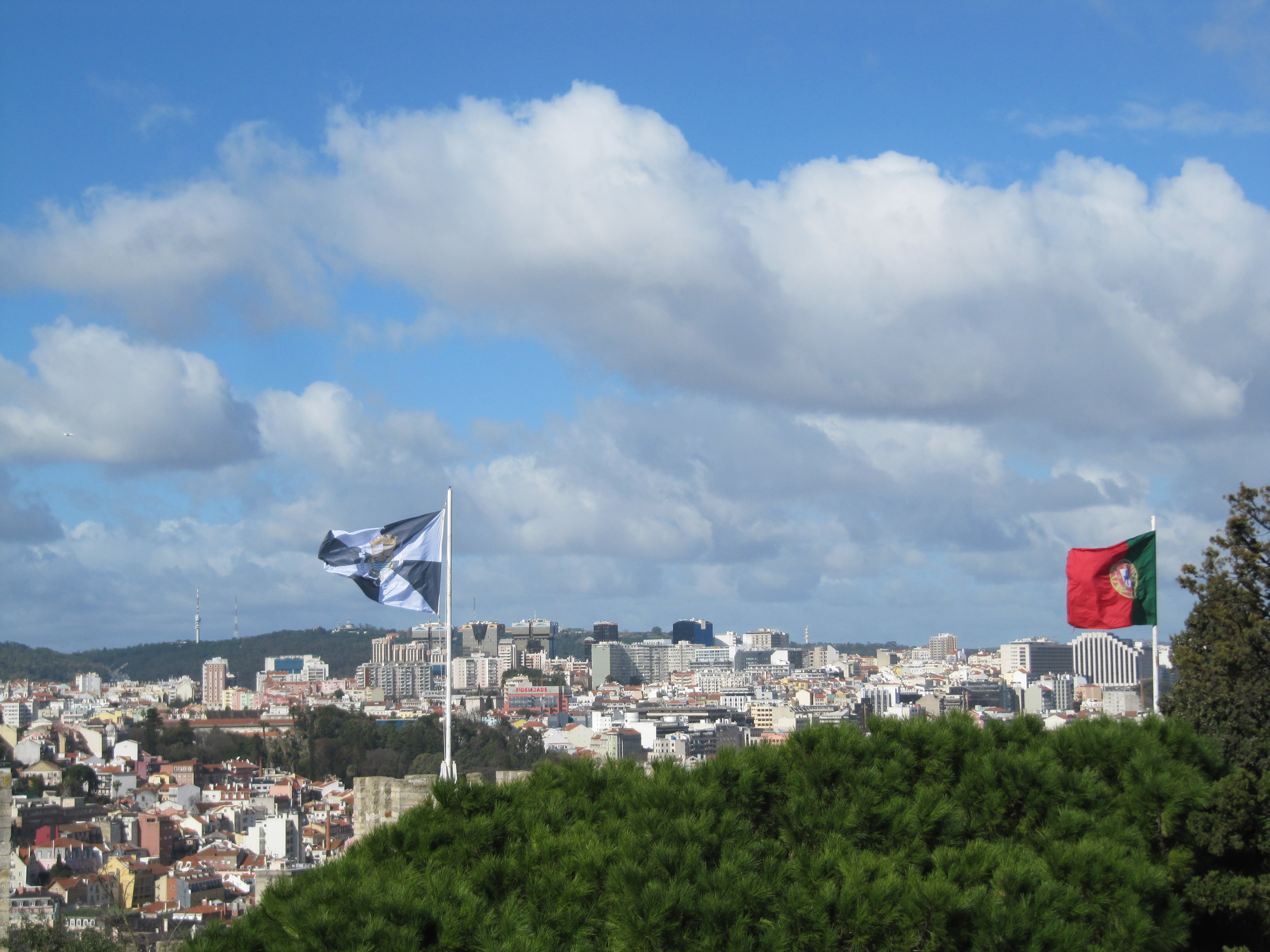 Castelo de São Jorge